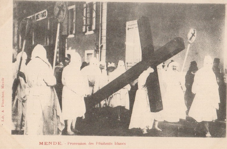 Mende - Procession des Pénitents Blancs